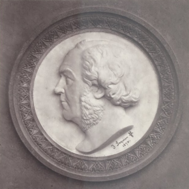 Médaillon représentant Pierre-Philibert Pompée, par Justin Lequien fils (photographie de Lampué).